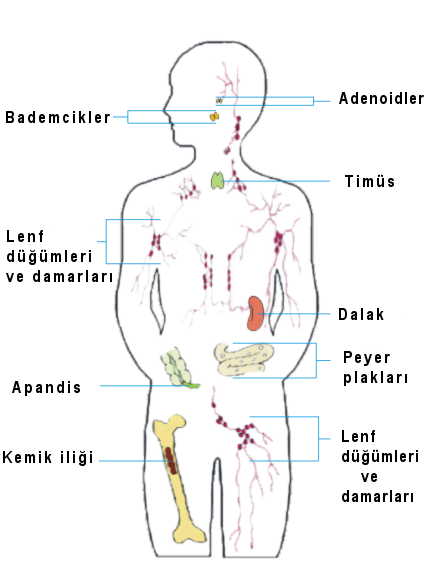 Schematische Zeichnung der Organe mit Bedeutung für das Immunsystem